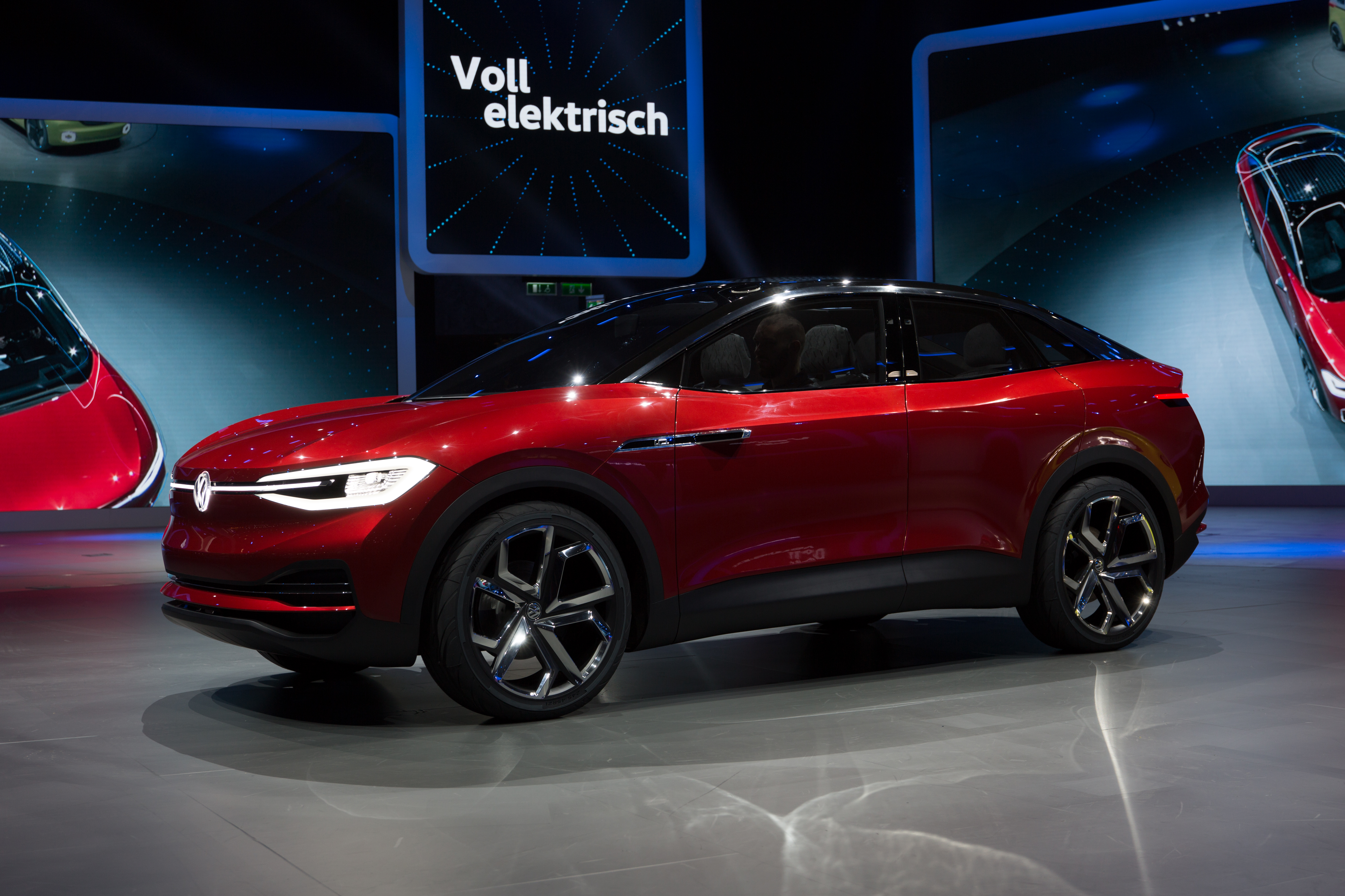 IAA 2017